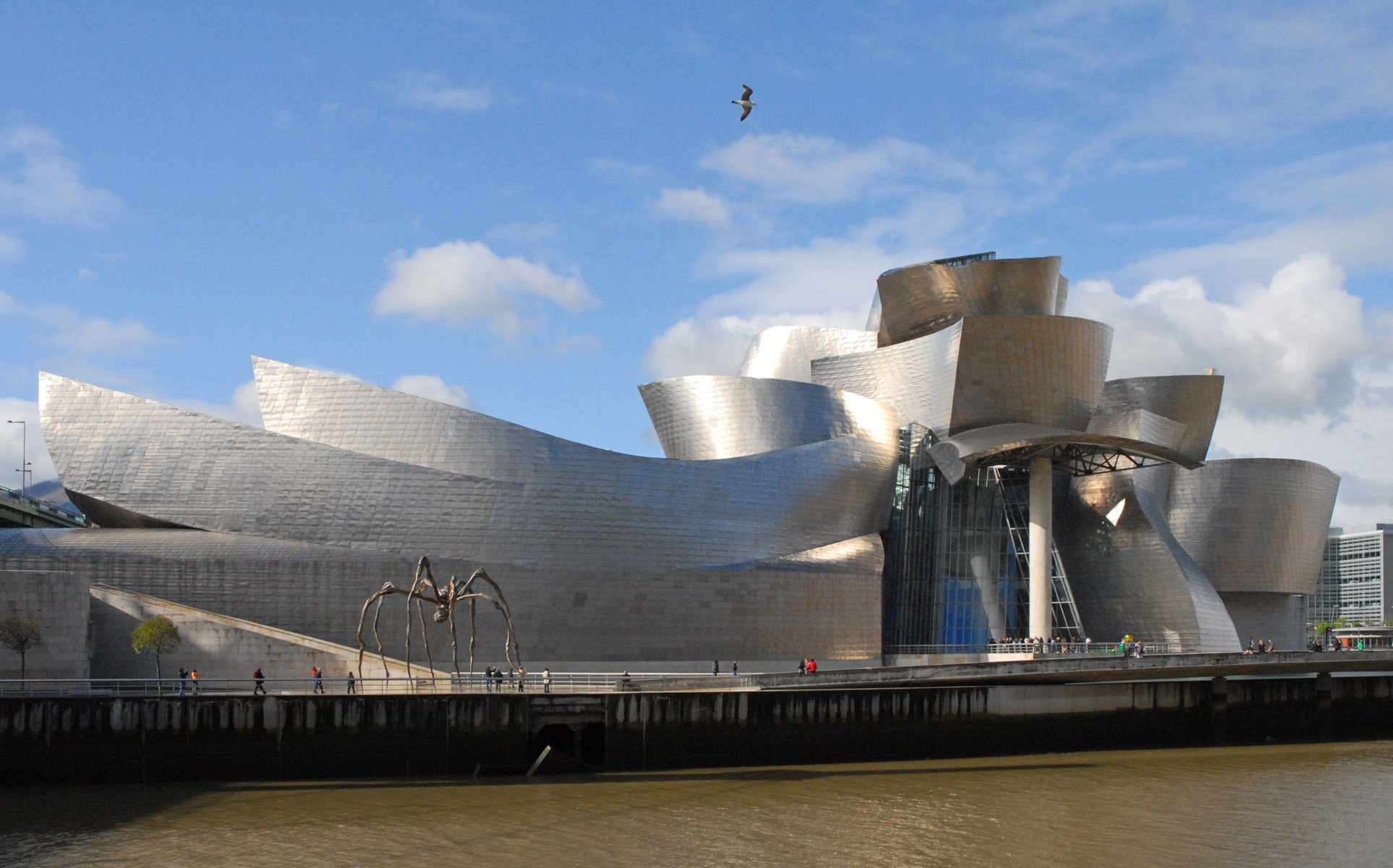 Inauguré en 1997, le musée Guggenheim de Bilbao a été conçu par l'architecte américain Frank O. Gehry. Situé au bord de la ria de Bilbao, il a transformé, en dix ans, l'image de cette ville du pays basque, frappée par la crise industrielle. Il présente des collections d'art contemporain et des expositions temporaires de niveau international. Au premier plan, la sculpture "Maman" de Louise Bourgeois date de 1999.